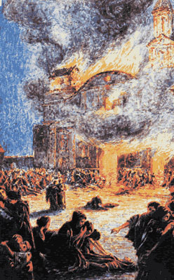 Incendio de la Iglesia de la Compañía en Santiago de Chile, ocurrido el 8 de diciembre de 1863.